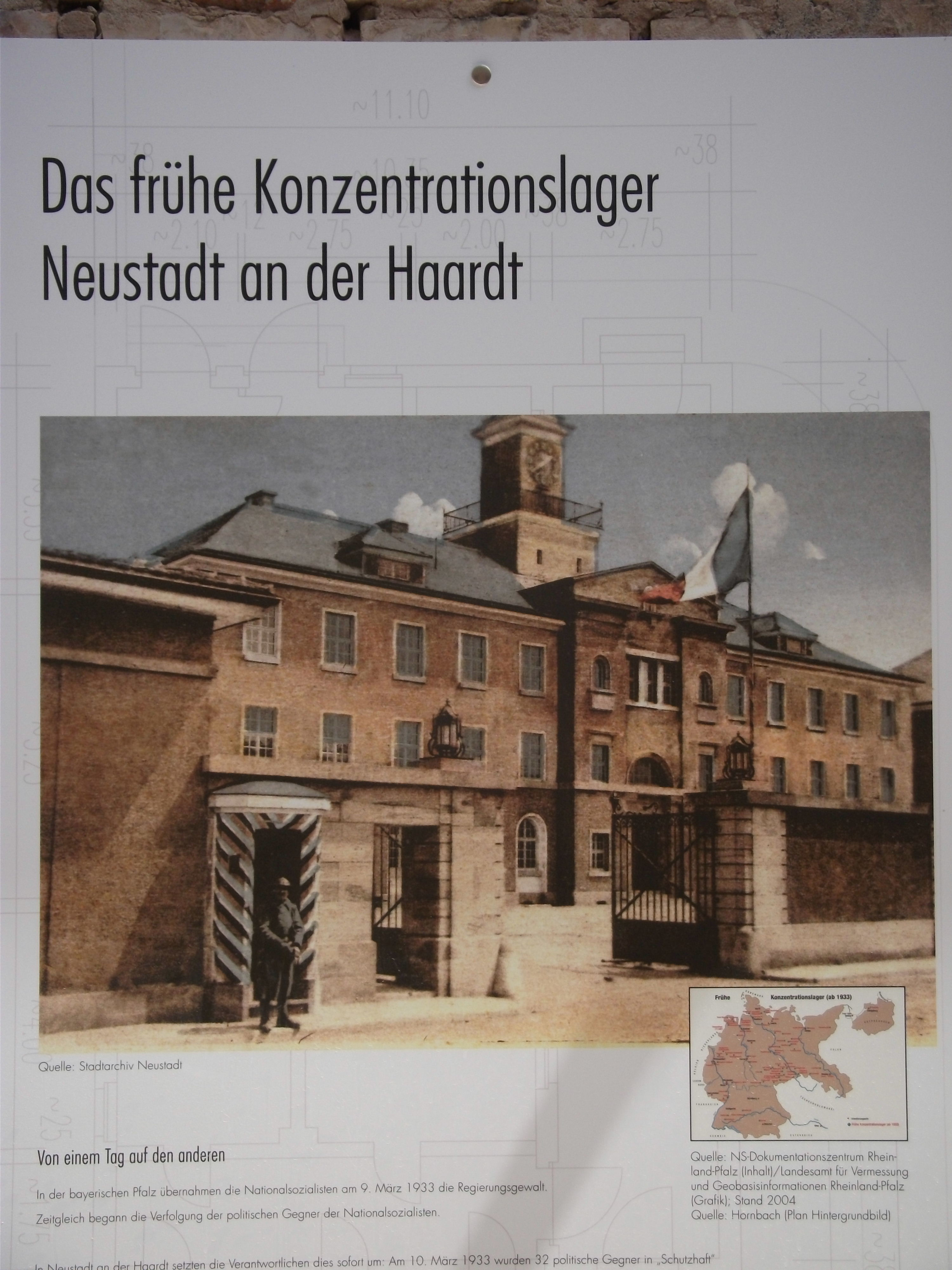 Infotafel des Foerdervereins Gedenkstaette mit Reproduktion einer Abbildung der Turenne-Kaserne Neustadt an der Weinstraße waehrend der Nutzung in den 1920er Jahren durch die franzoesische Besatzungsmacht (siehe Trikolore)